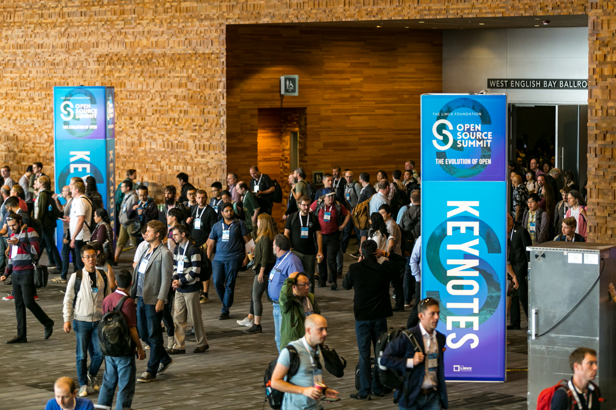 OpenSourceSummit_Vancouver_180829_daily01-26